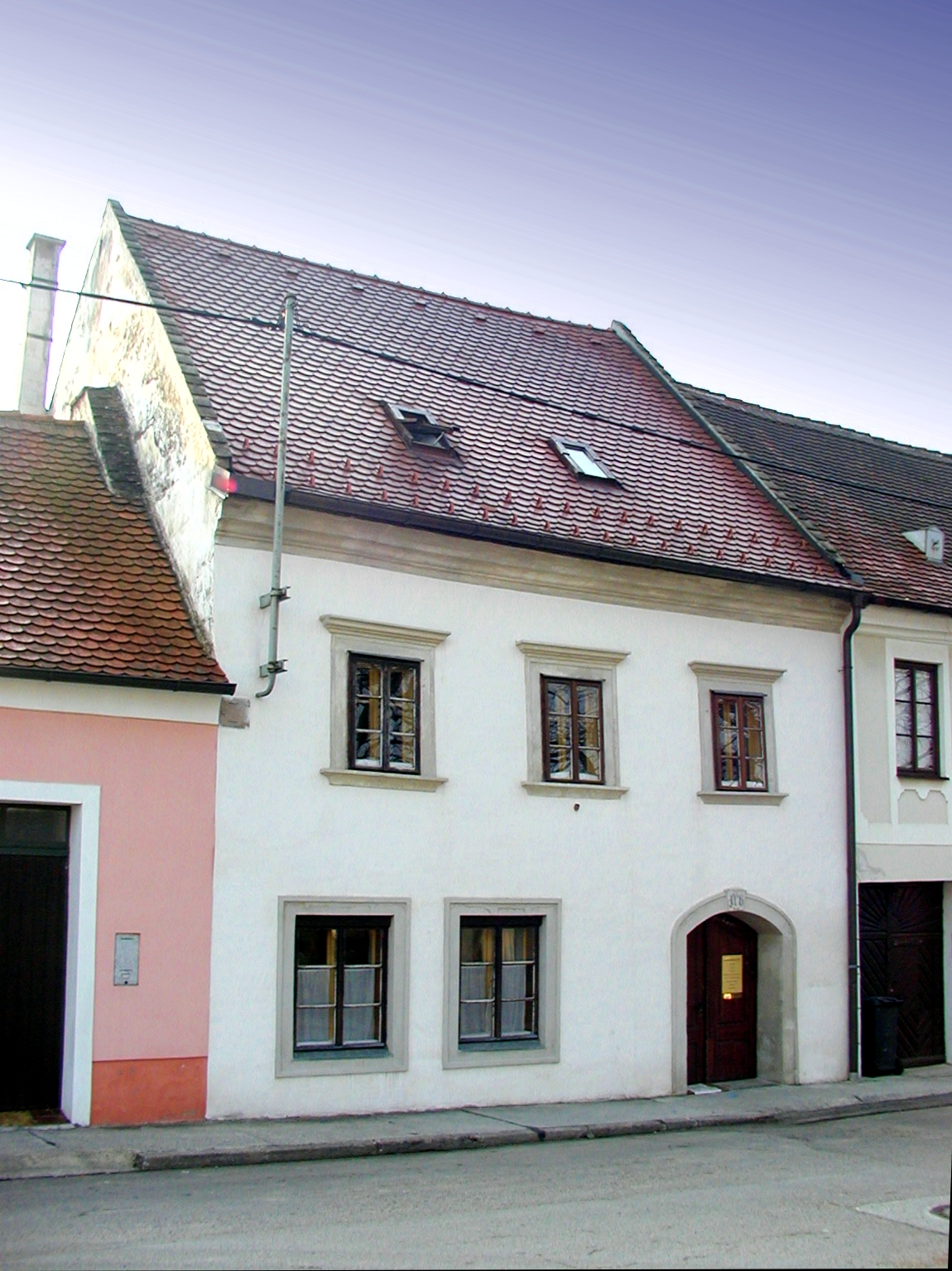 Sitzendorf Hauptplatz 6